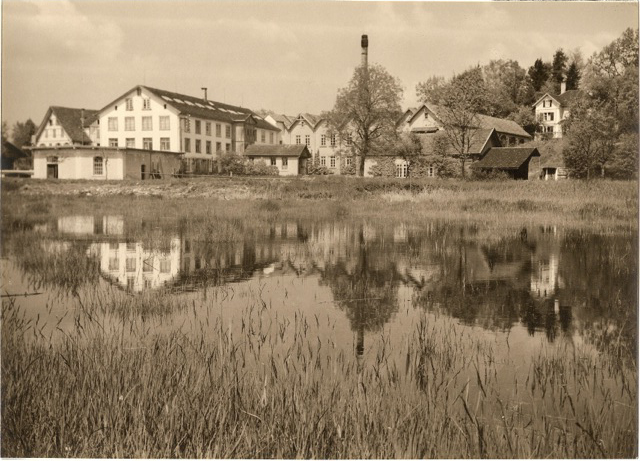 Seidenweberei Ottenbach ZH, Schweiz